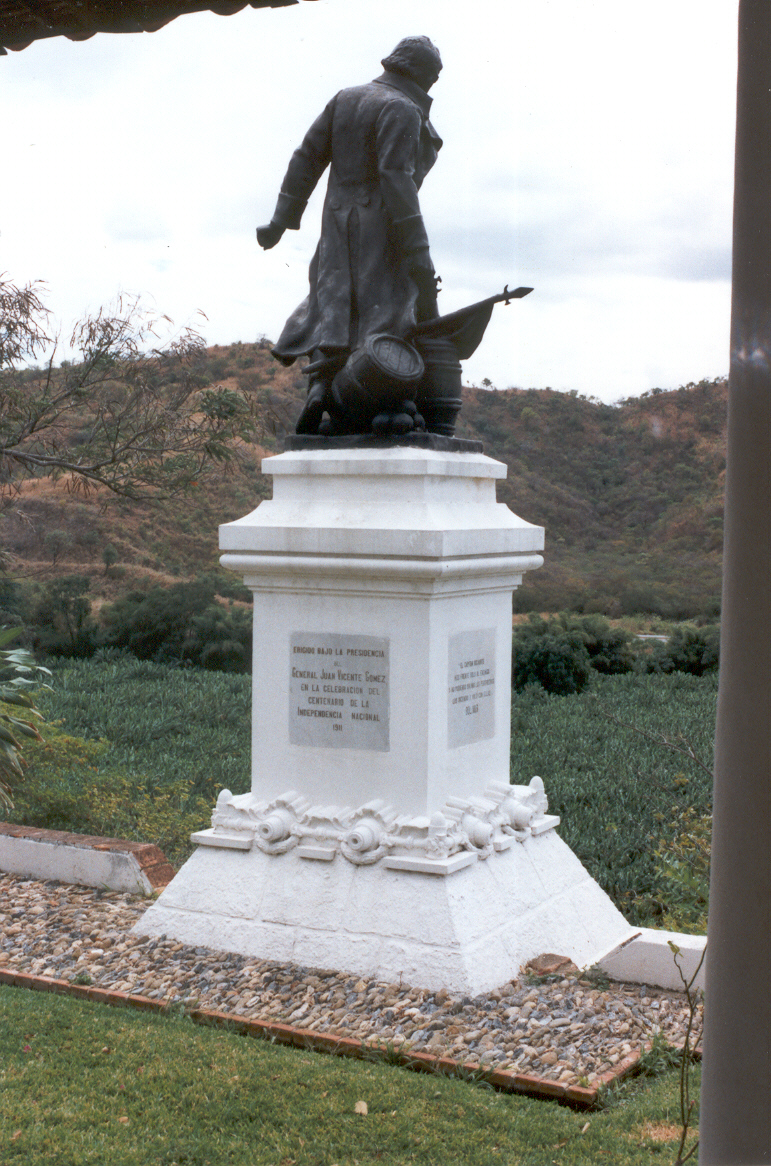 Estatua de Ricaurte en San Mateo erigida en 1911, año centenario de la Independencia de Venezuela Estatua de Ricaurte en San Mateo, Estado Aragua (Venezuela), en el momento de inmolarse con la voladura del polvorín que el ejército patriota venezolano tenía en este lugar, con el fin de evitar que cayera en manos enemigas. Autor: Fev. Fecha: Febrero 2000.